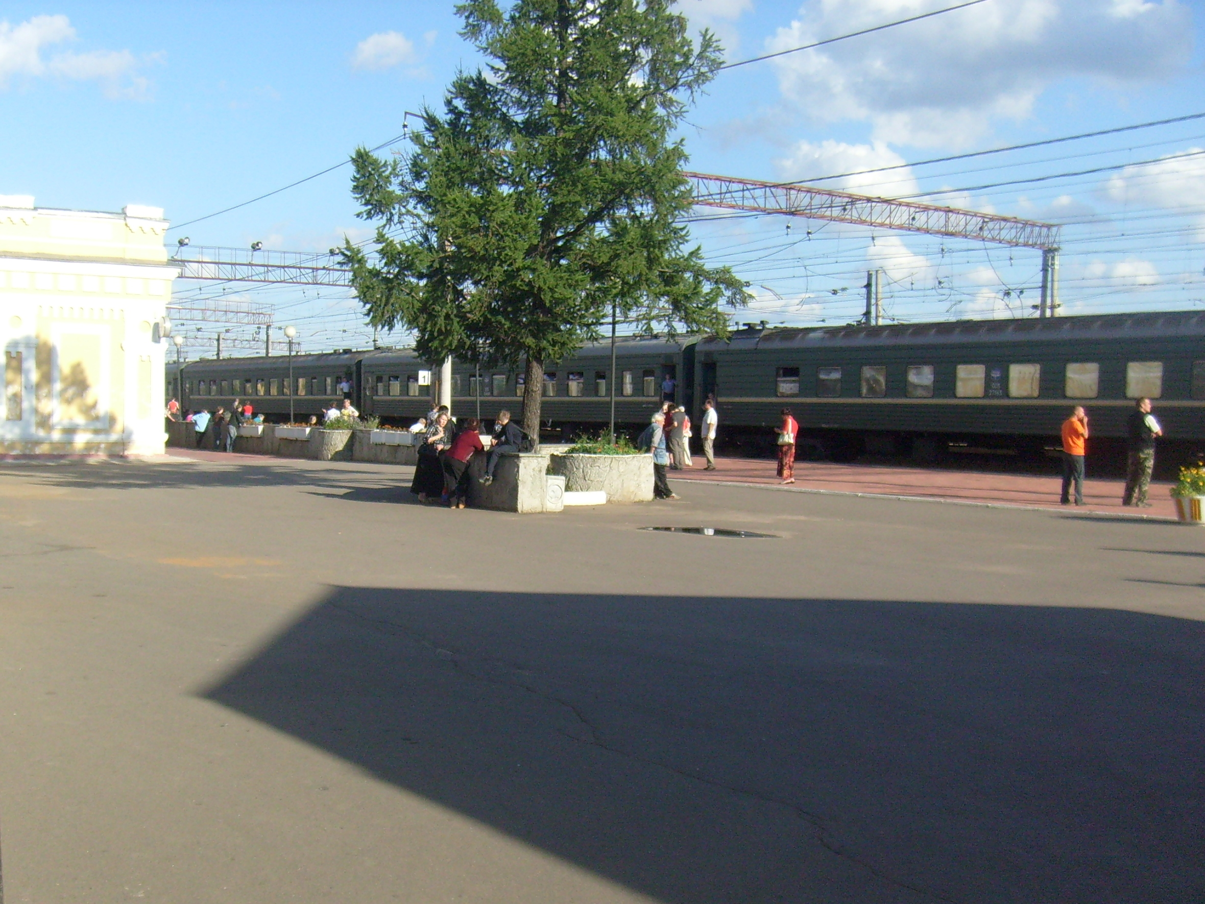 Own work